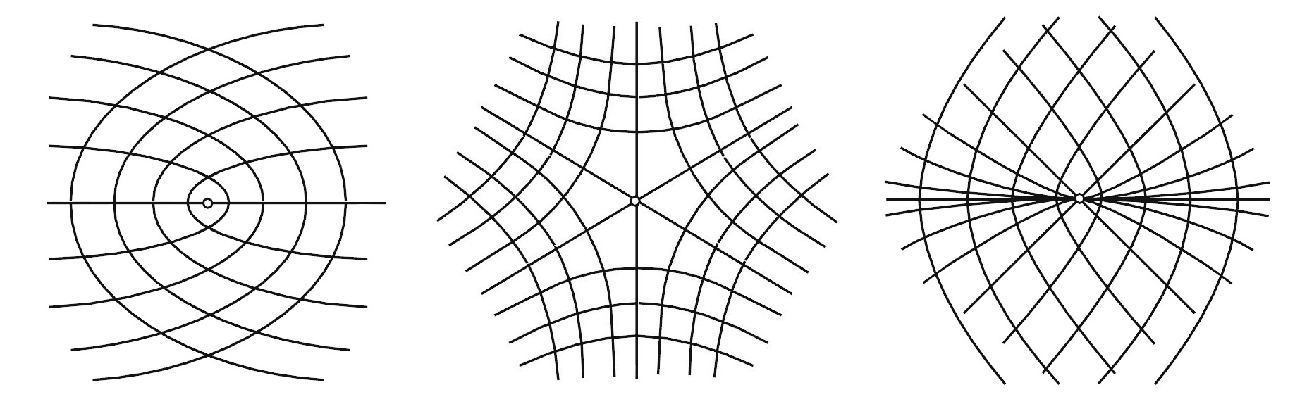 Омбилические точки и сеть линий кривизны поверхности (рисунок).